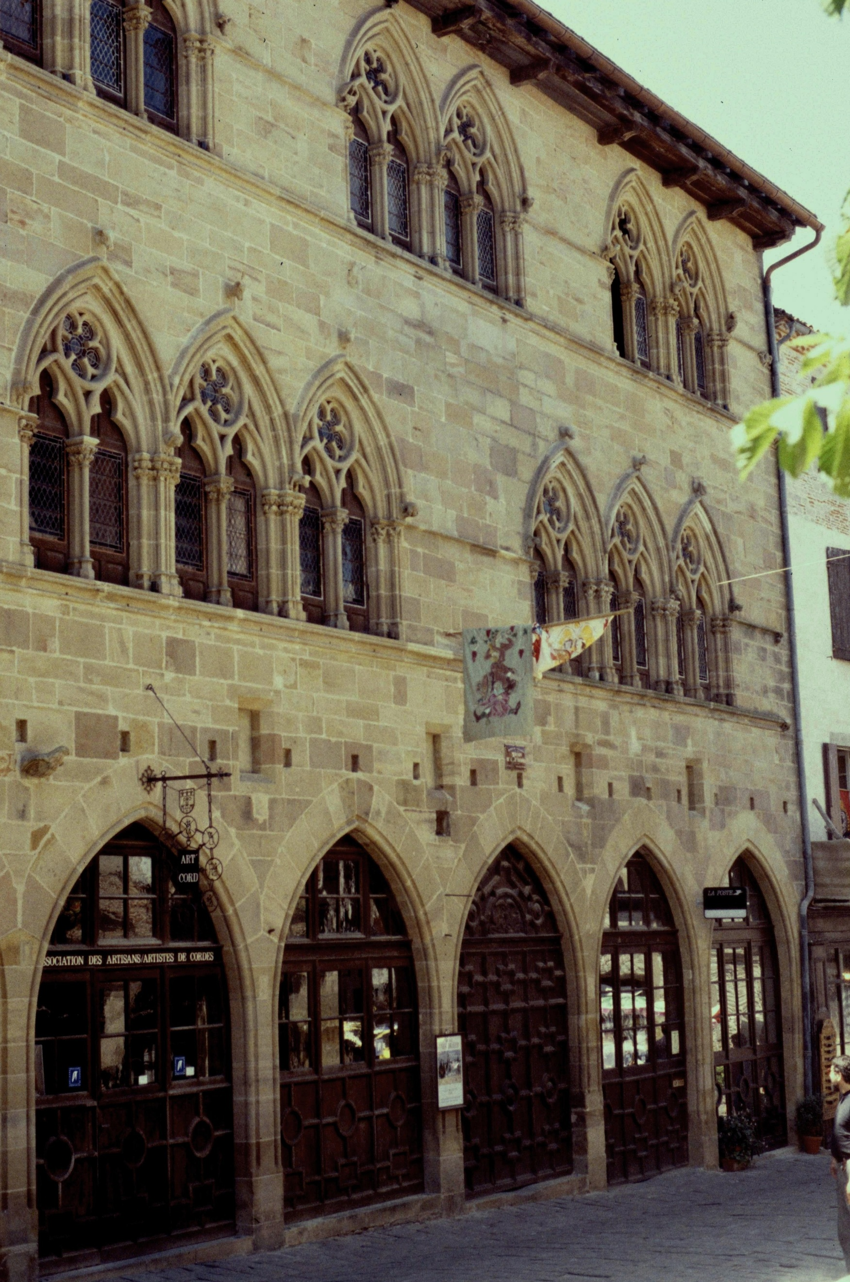 Tarn Cordes Maison Du Grand Fauconnier